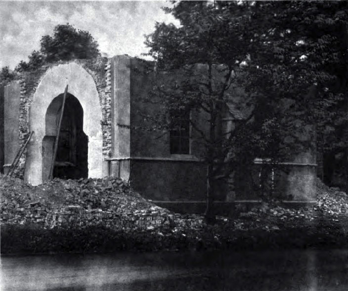 Die Grimberger Schlosskapelle (heute Schloss Herten) beim Abbau 1908